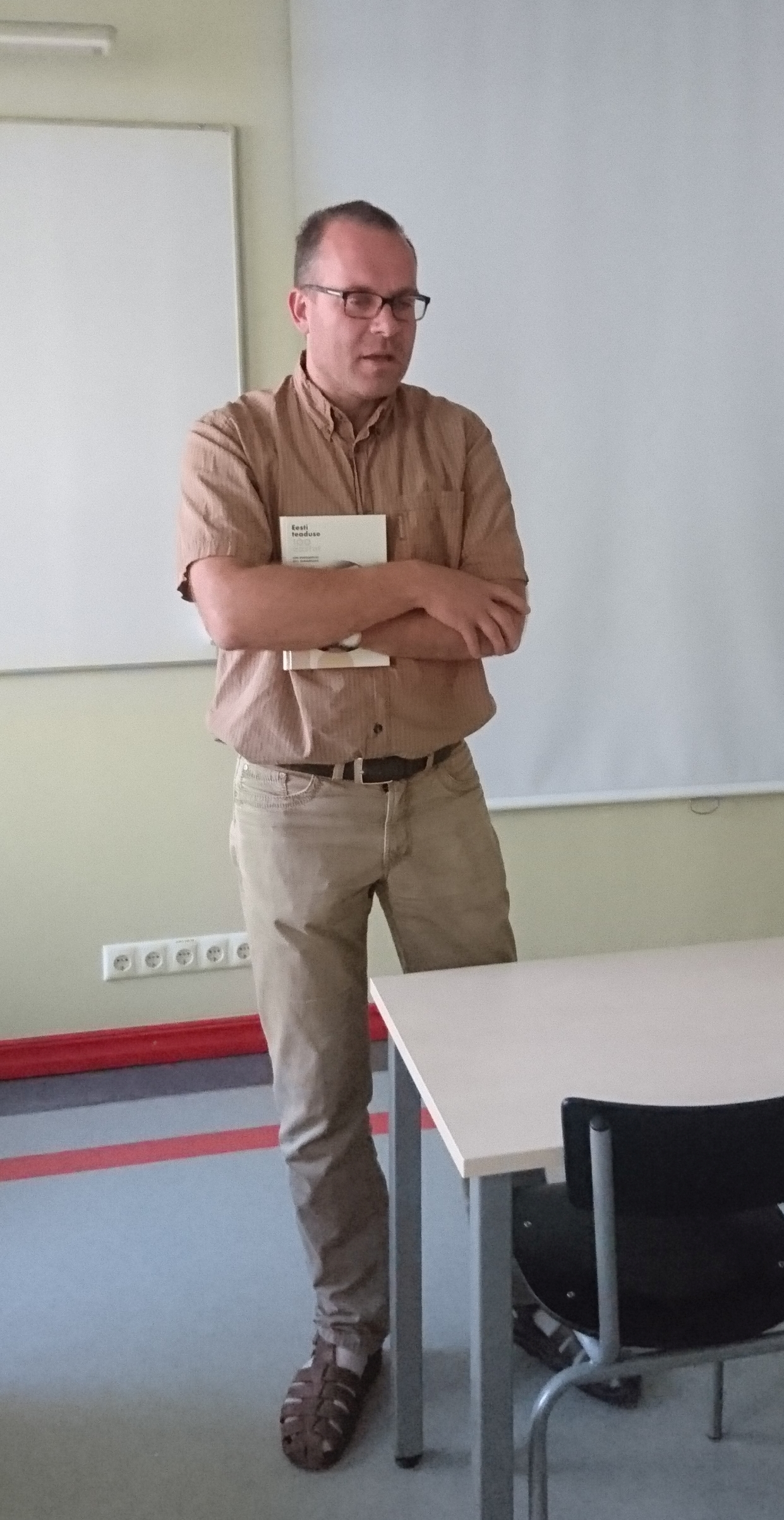 Teadusloolane Erki Tammiksaar Teadusajaloo ja Teadusfilosoofia Eesti Ühenduse koosolekul 25. mail 2018.